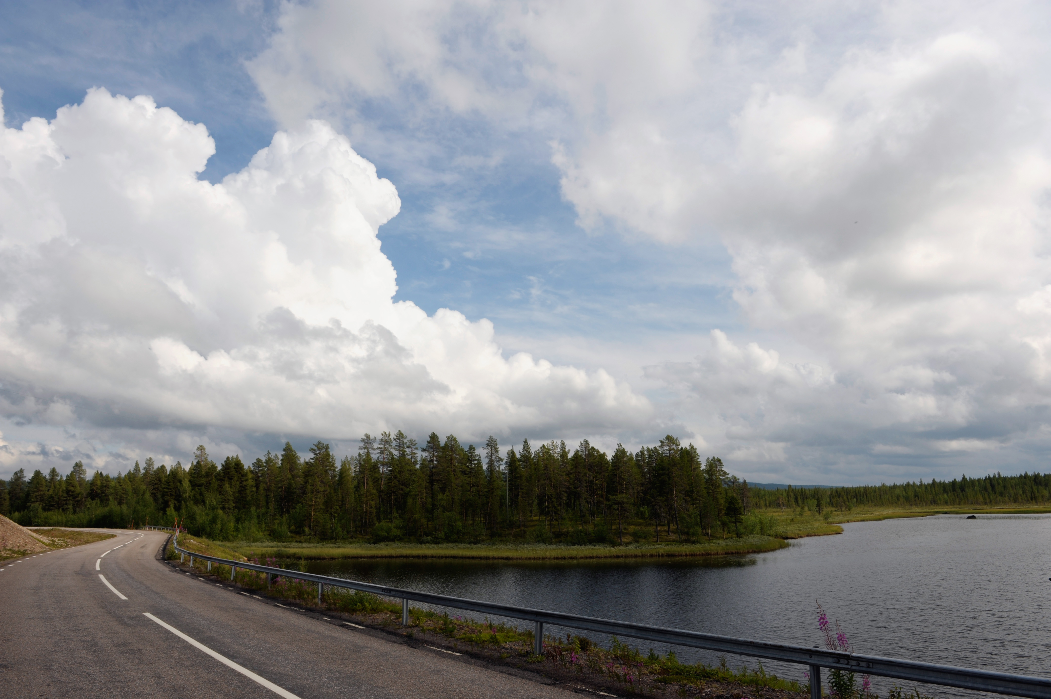 Sjö (Salmijärvi, sjö-id 753758-171645) i Lappland Sverige Data-uid: 4f523223dcf3dbf56f1ee93d86dd6459